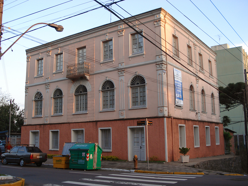 Arquivo Histórico Municipal João Spadari Adami, Caxias do Sul, Brasil